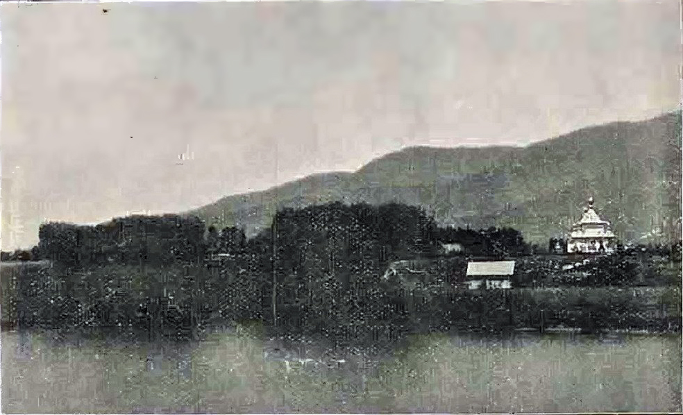 Свято-Троицкий монастырь на озере Иссык-Куль